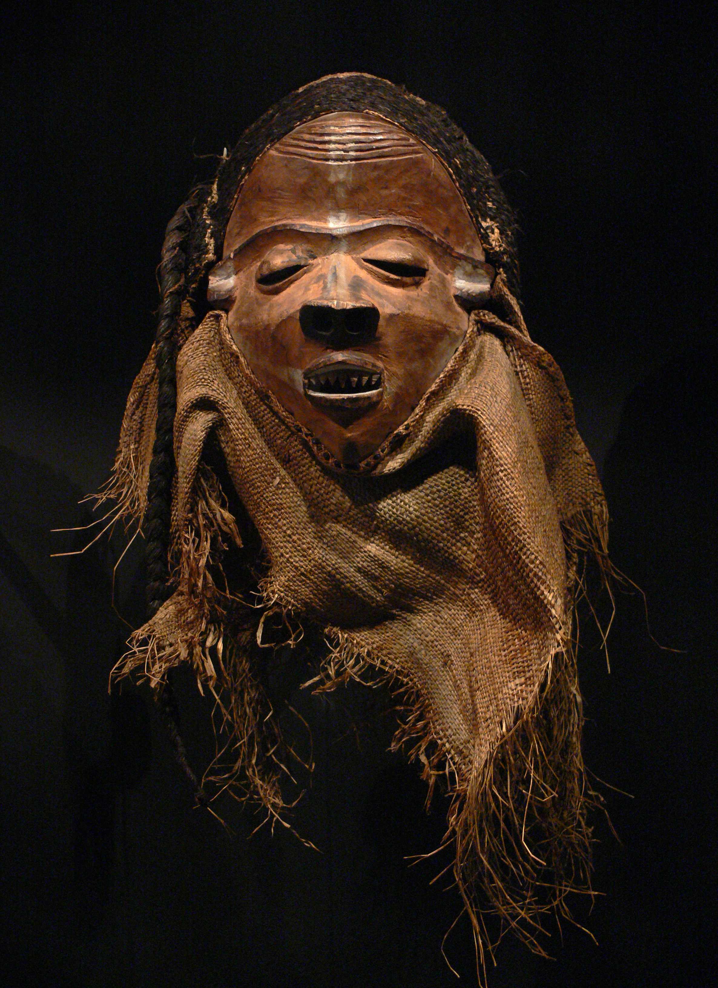 Maske nganga ngombo, Demokrat. Republik Kongo, Pende; 20. Jh.; Holz, Raphiagewebe, Bastfasern; Afrikaabteilung, Ethnologisches Museum Berlin, Inv. Nr. III C 45370